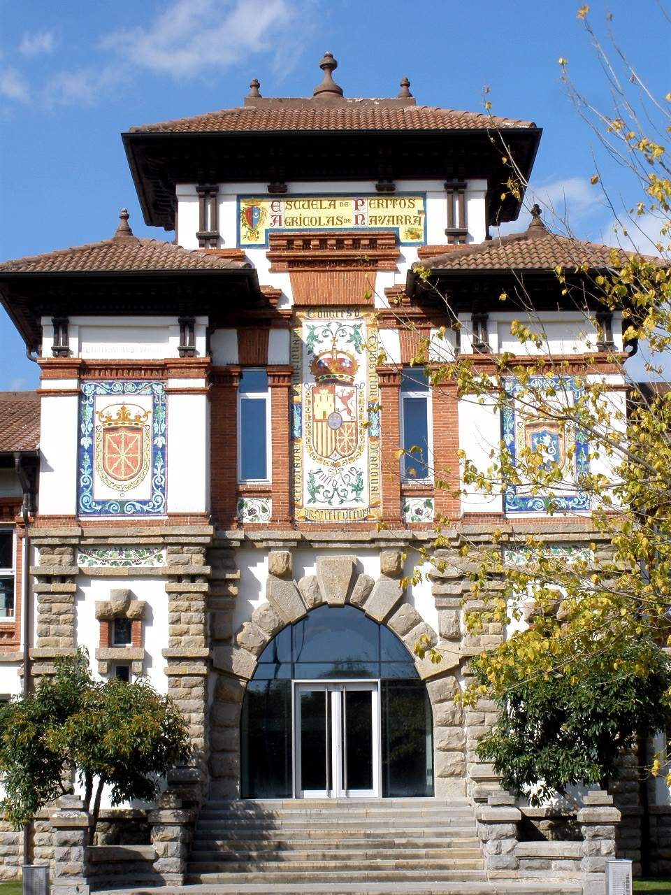 Laboratorio Agroquímico de Navarra, en Villava